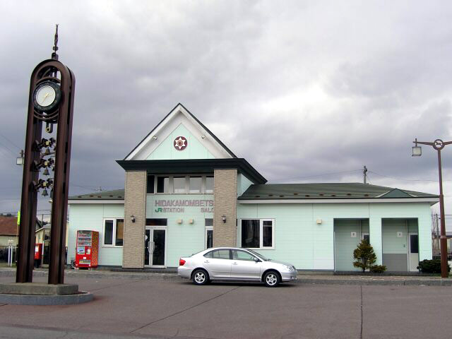 Hidaka-mombetsu Station in Hidaka Main Line, Japan